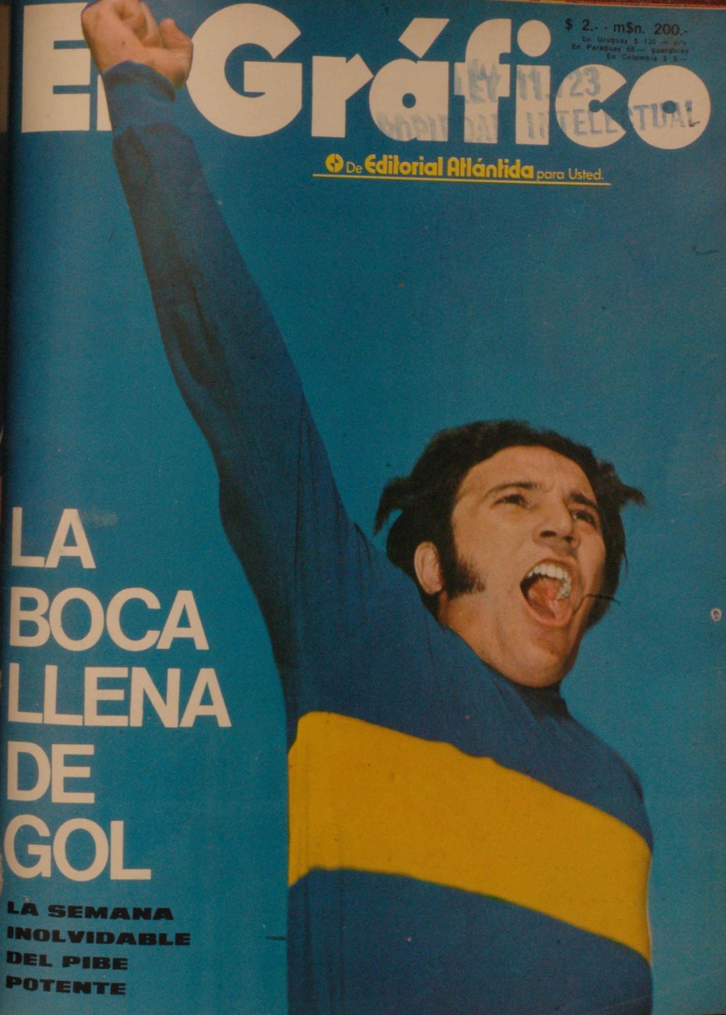 El Grafico del 21 de Marzo de 1972. Edicion 2737